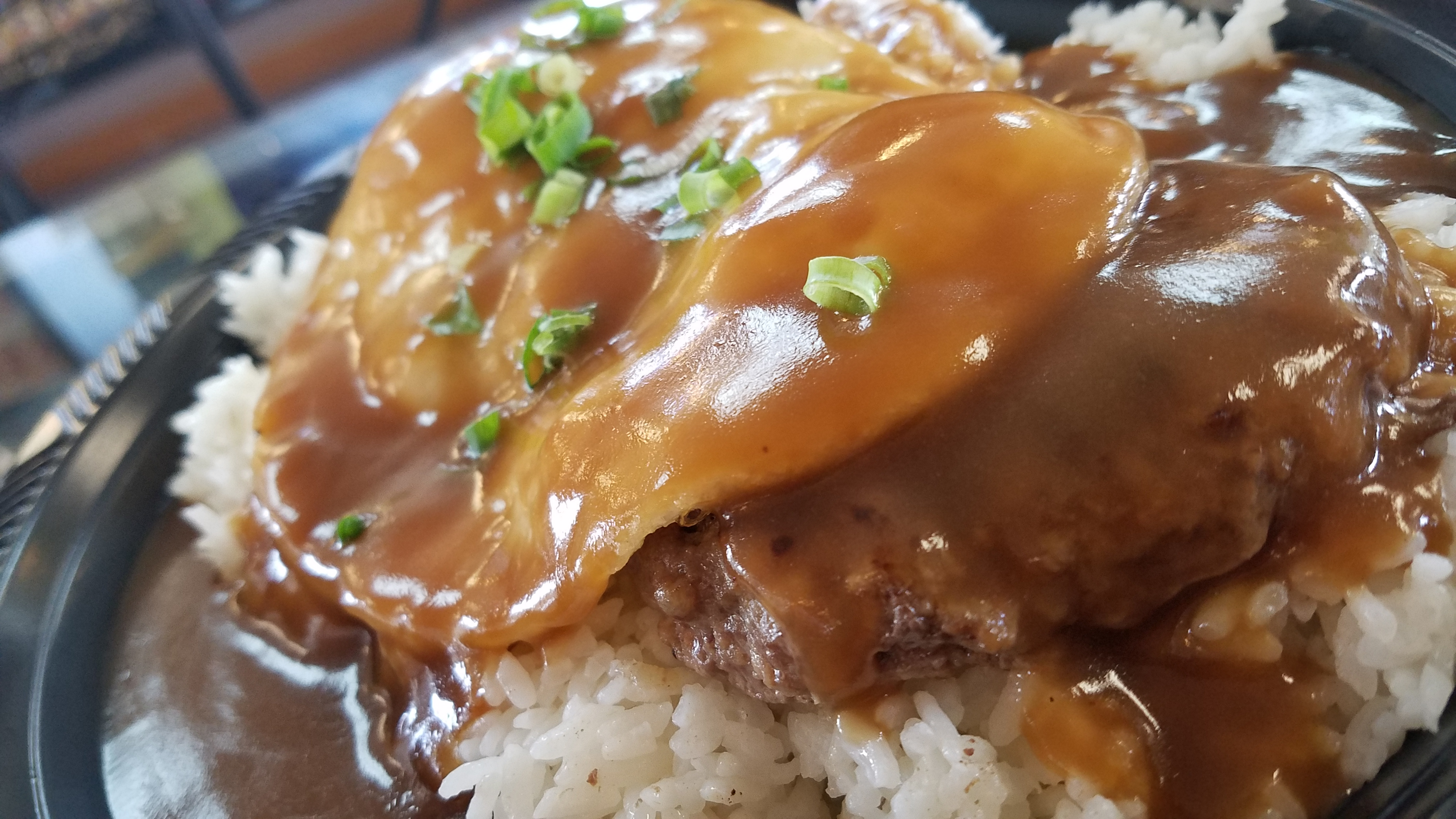 Loco moco